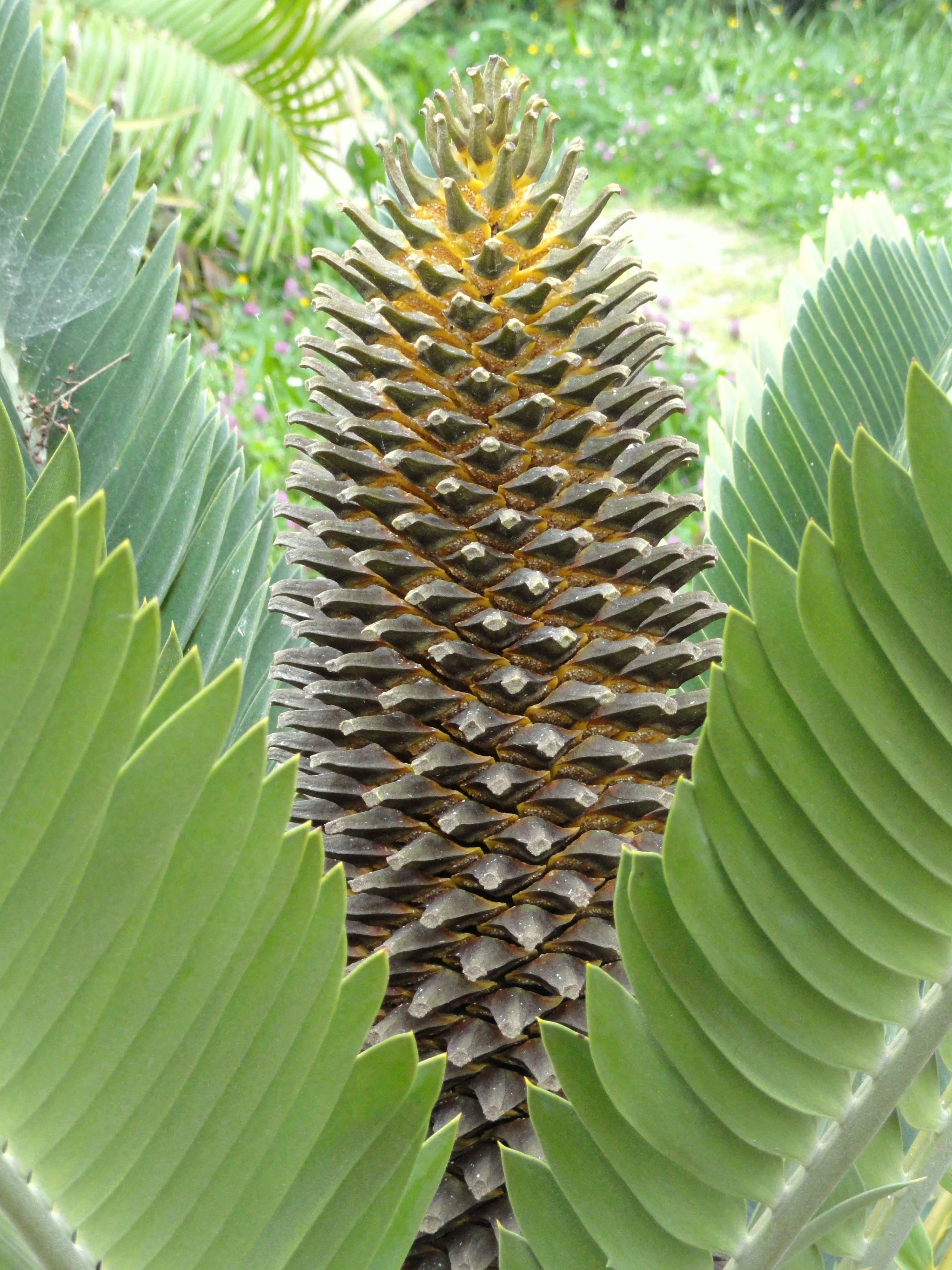 Encephalartos longifolius specimen in the Jardin botanique de la Villa Thuret, Antibes Juan-les-Pins, Alpes-Maritimes,France.